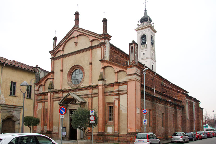 Chiesa di Santa Maria delle Grazie (o chiesa di San Martino) a Novara